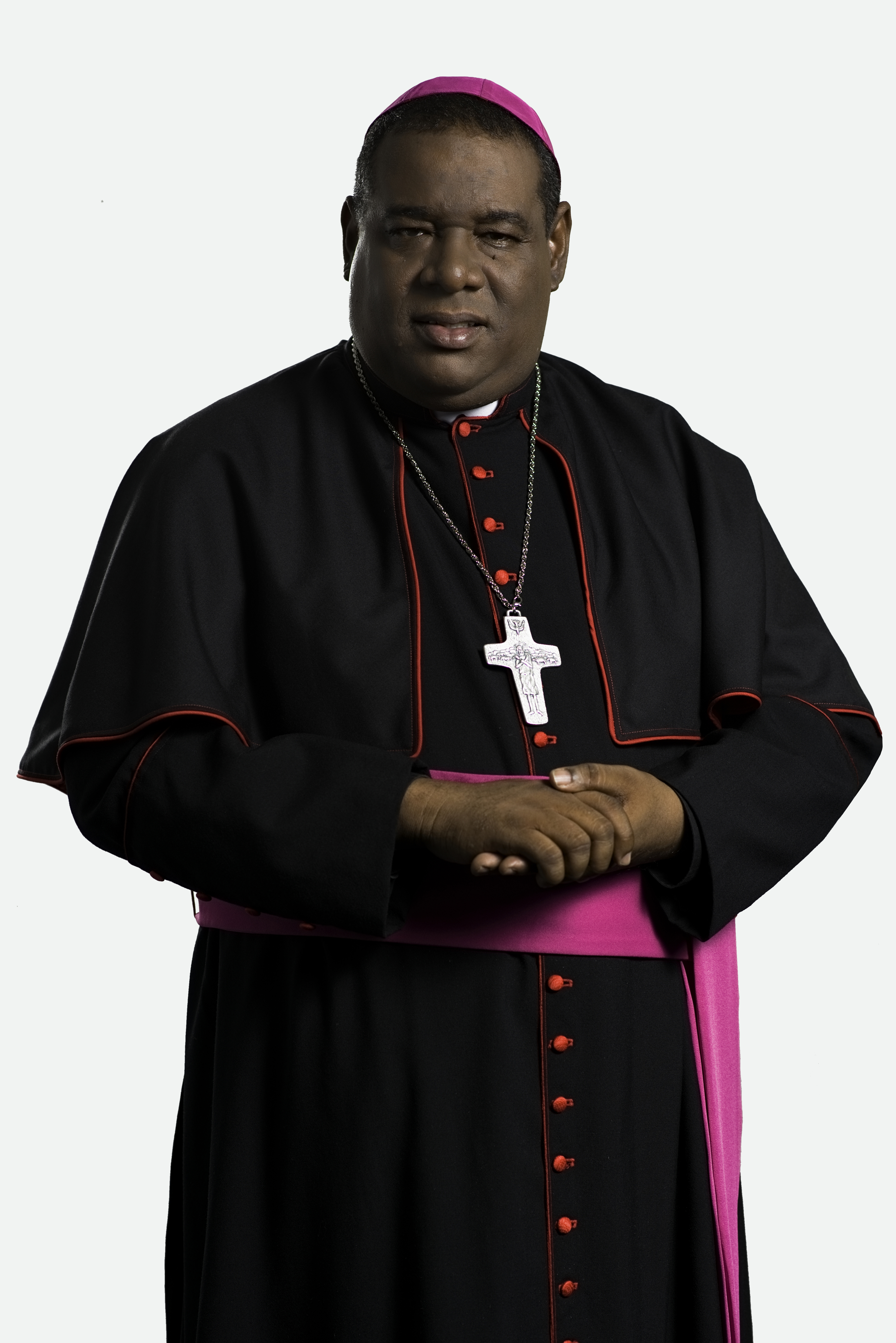 Obispo Auxiliar de Santo Domingo